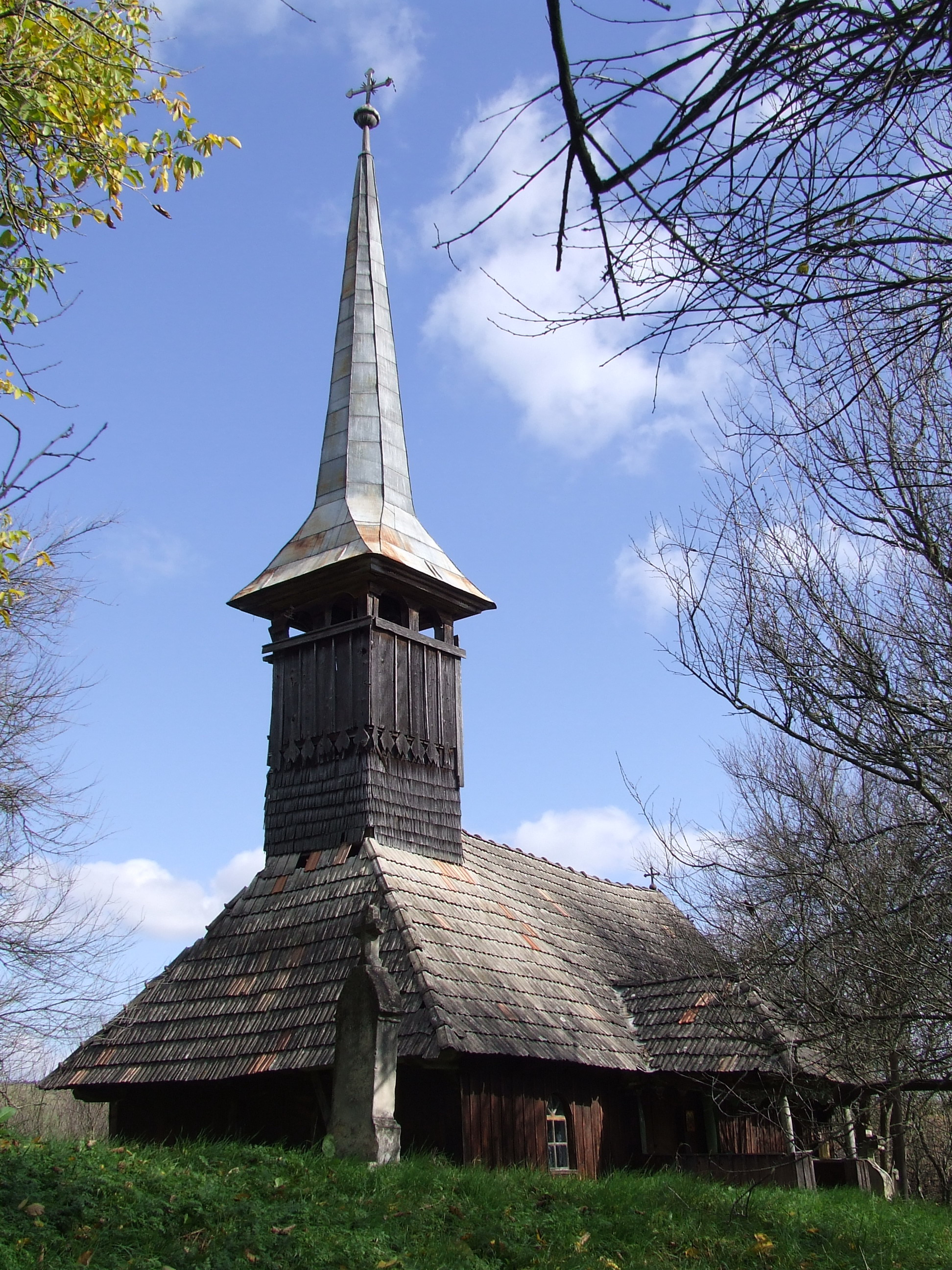 Biserica de lemn din Mierţa, Sălaj. Autor: Bogdan Ilieş Data: 14 octombrie 2007